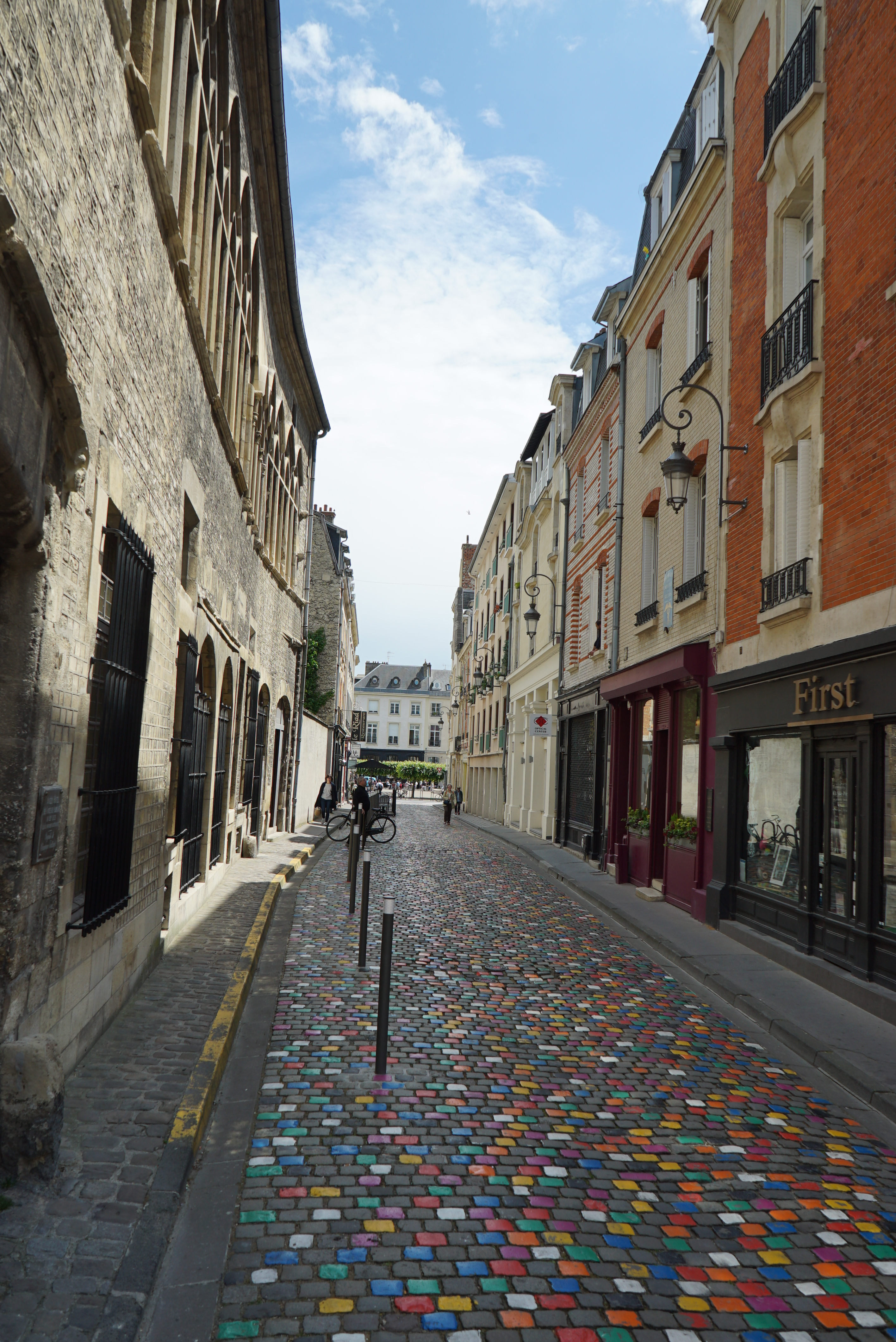 la rue décorée en 2019.